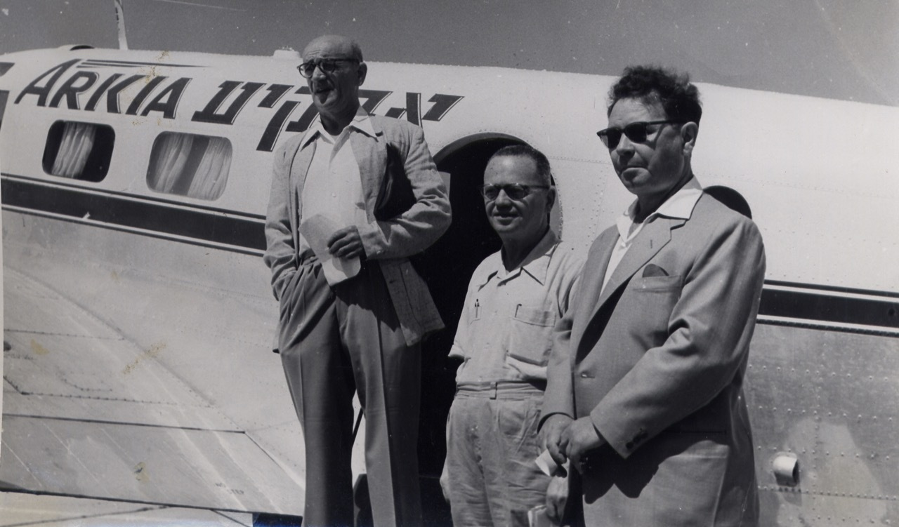 יעקב הוזמן (שמאל) ושר התחבורה דאז דוד רמז (ימין) ליד מטוס ארקיע